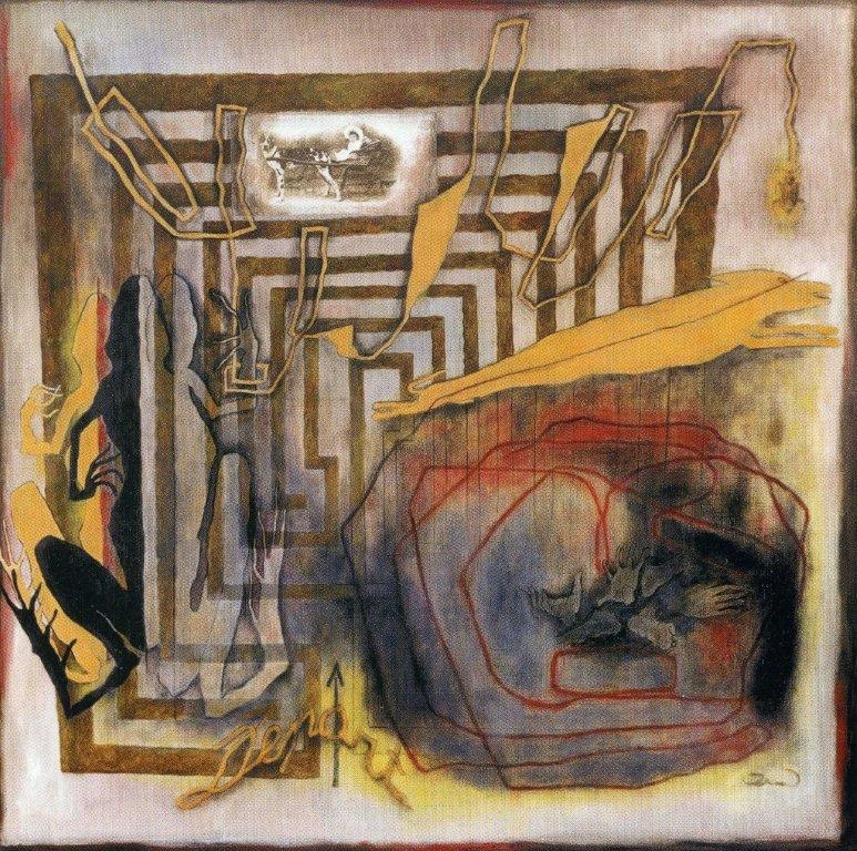 Labyrinthe, Huile sur toile, 100x100 cm